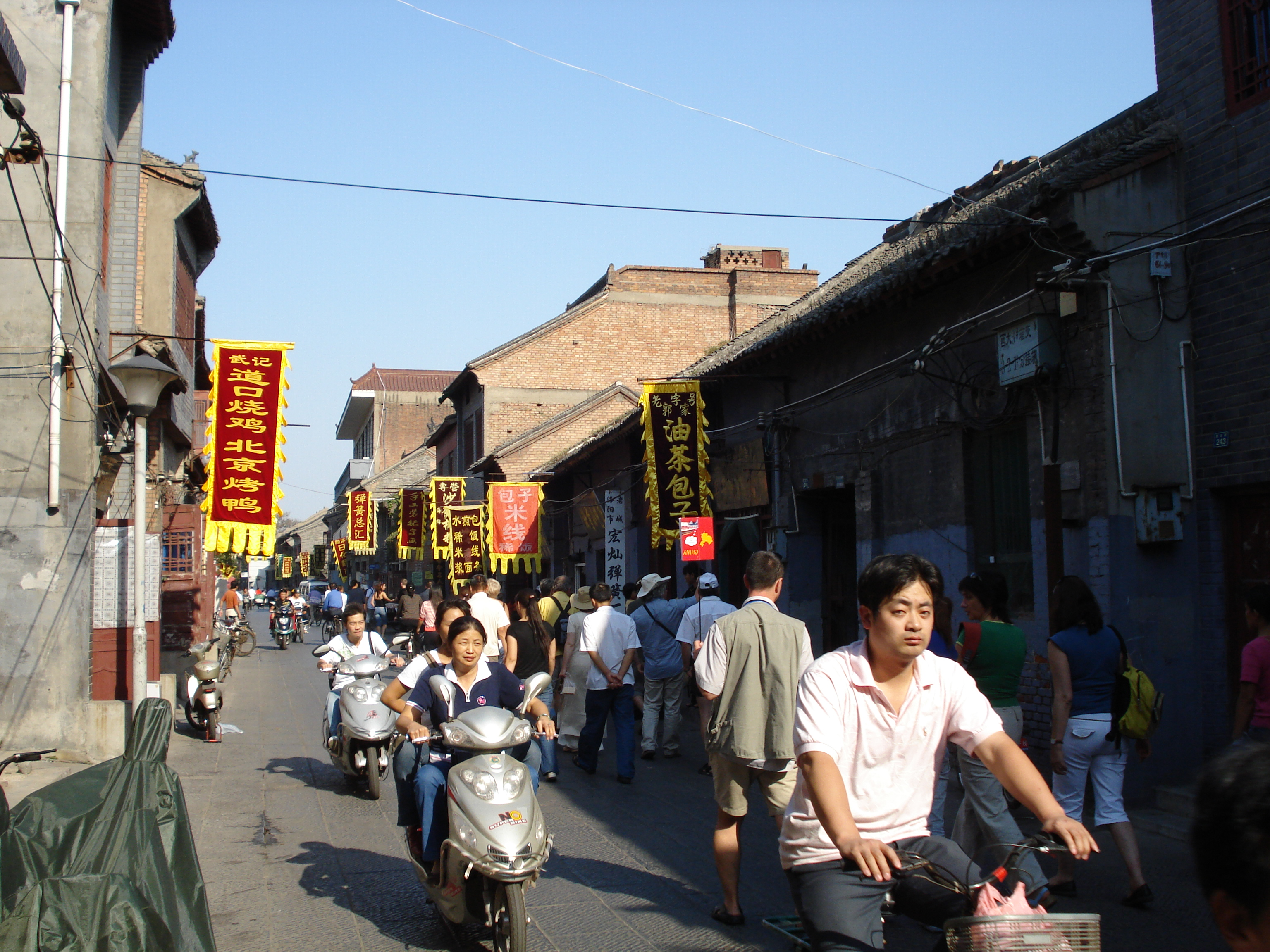 street in Luoyang